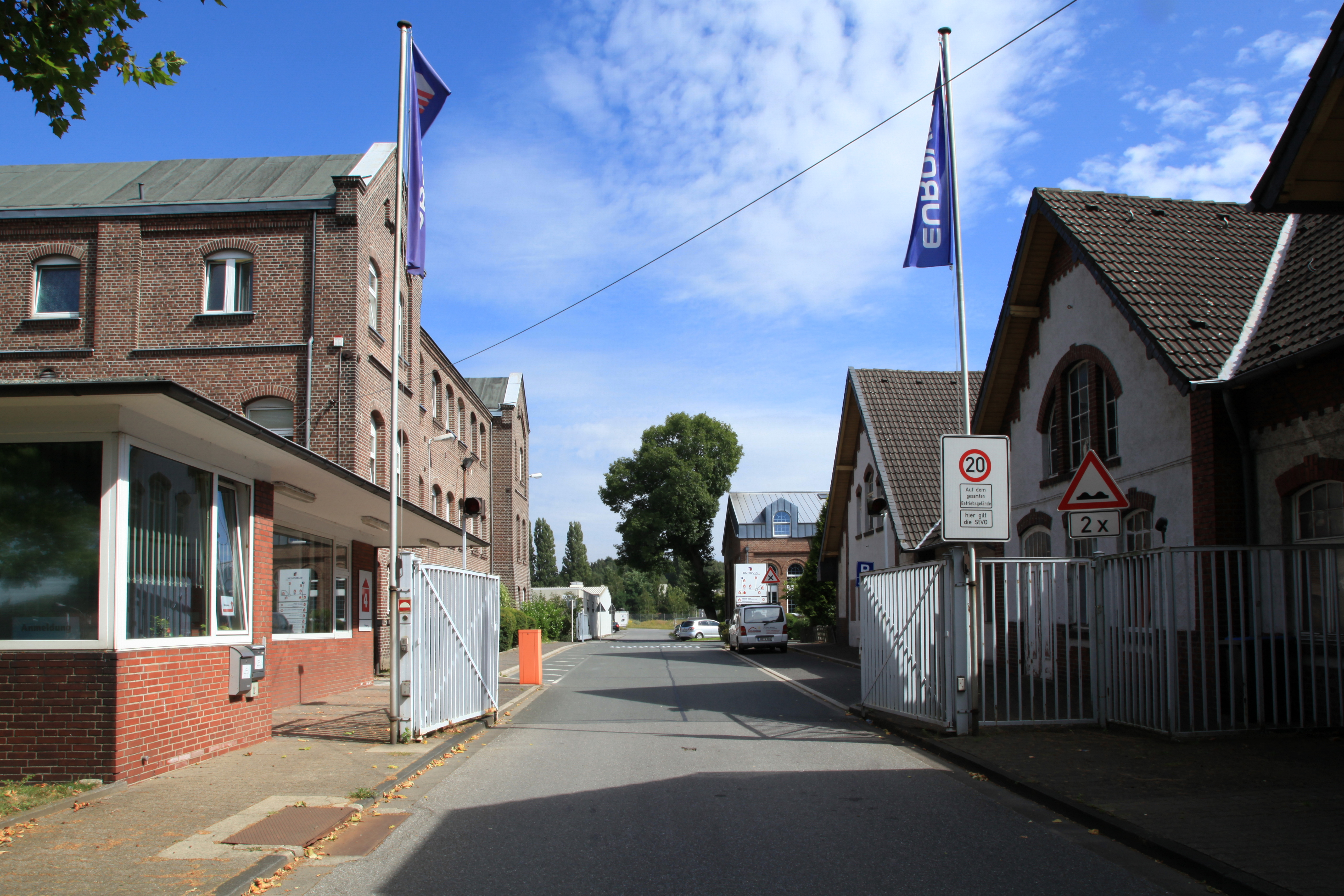 Verbliebene Gebäude der Zeche Rheinbaben, jetzt in Benutzung und auf dem Firmengelände von Eurovia Teerbau GmbH NL Bottrop, Rheinbabenstraße 75 in Bottrop. Die Aufnahmen auf dem eigentlich nicht zugänglichen Firmengelände entstanden mit freundlicher Genehmigung der Eurovia Teerbau GmbH.